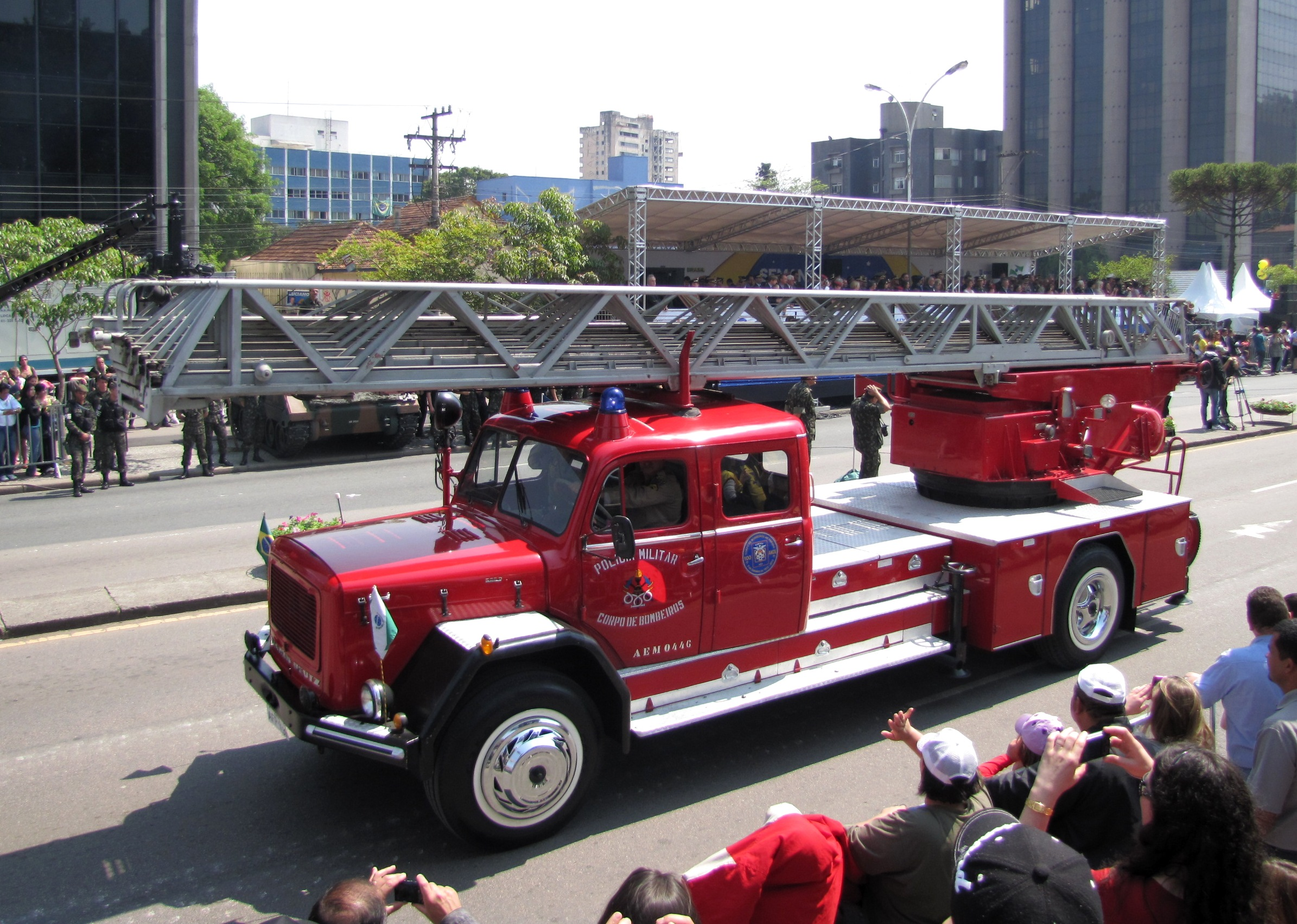 Viatura do Corpo de Bombeiros do Paraná, AEM (Auto Escada Mecânica).